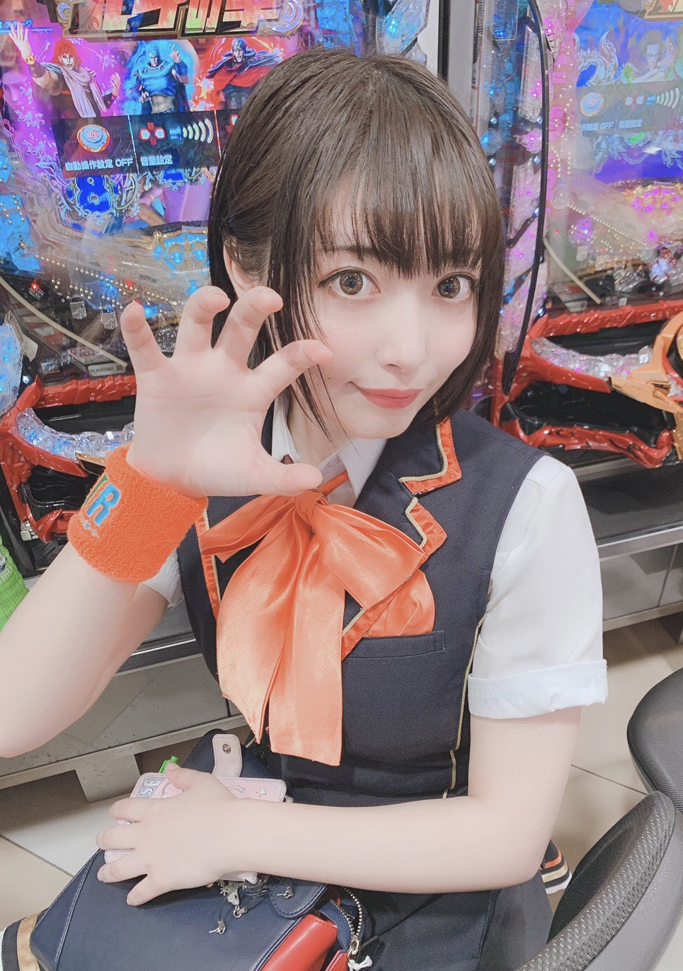 泉 明日菜